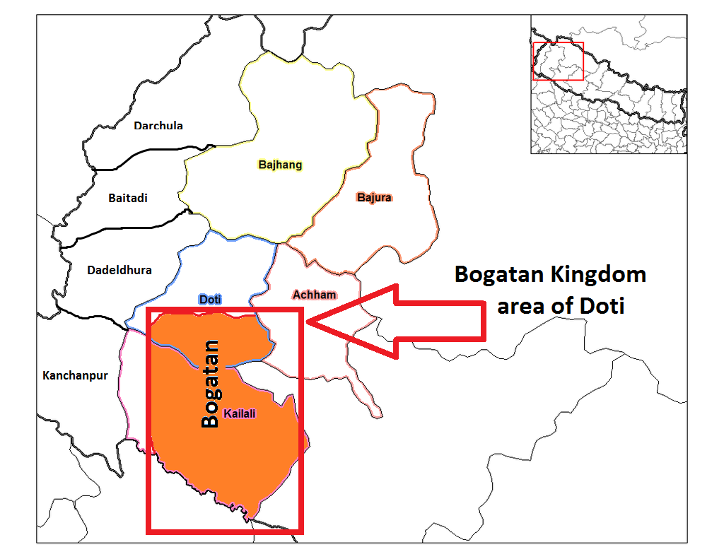 नेपाल भाषा: Doti Bogatan